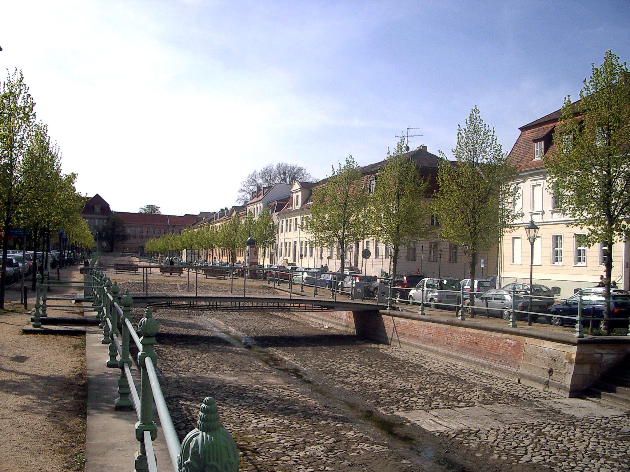 Teil des rekonstruierten Stadtkanals in der Yorckstraße in Potsdam. (Canal in Potsdam, Germany)